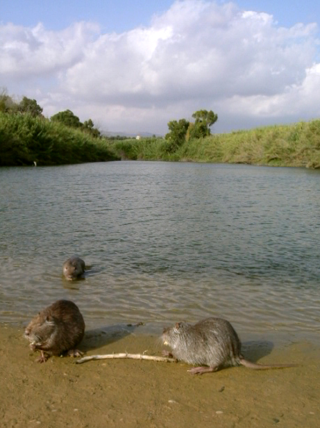 Nutrie alla Riserva Naturale Macchia Foresta del Fiume Irminio